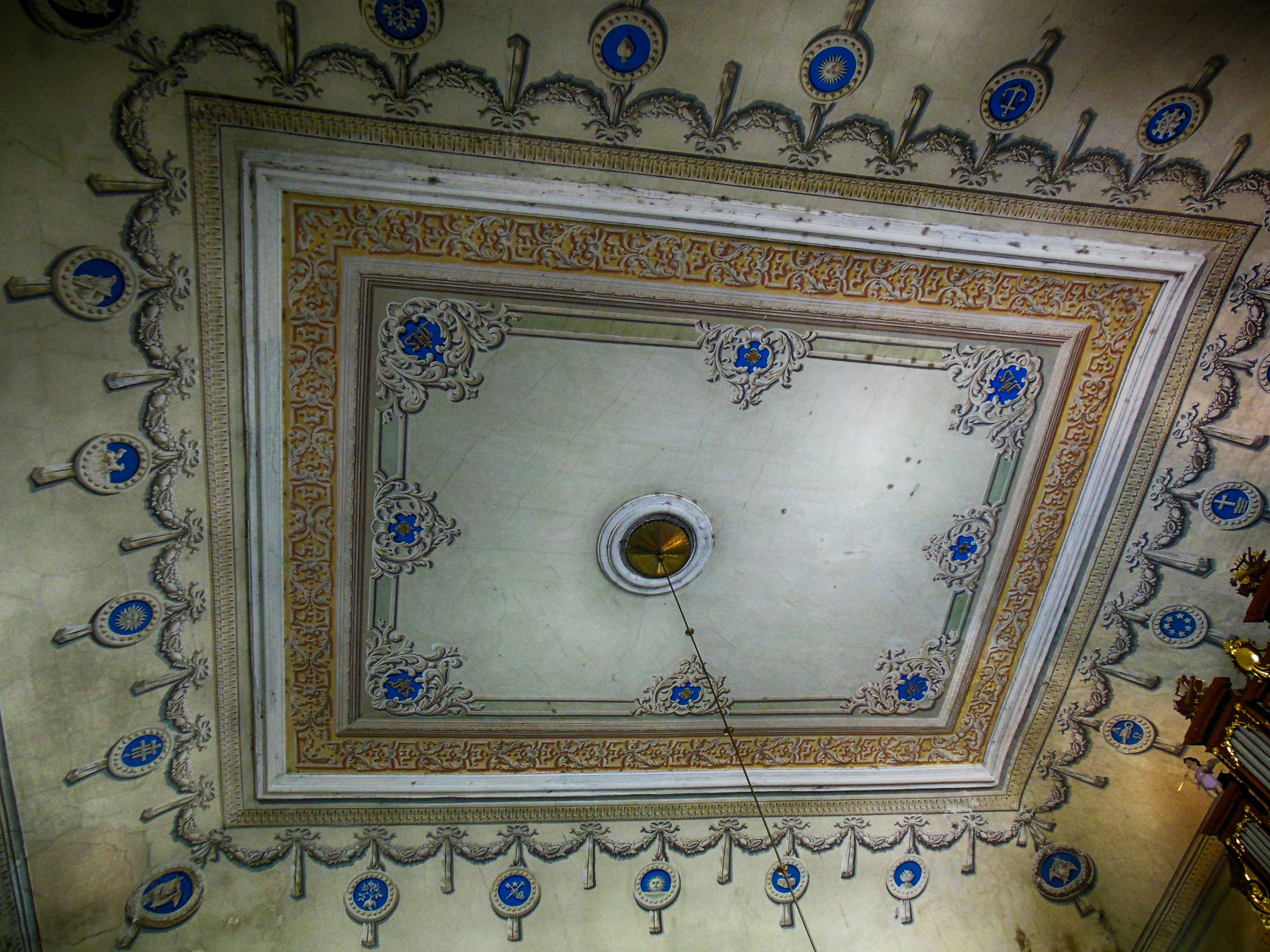 Беларуская (тарашкевіца): Касьцёл Сьвятога Яна Хрысьцiцеля, дэкаратыўнае аздабленьне інтэр’ера касьцёла: росьпісы скляпеньняў, алтары, арган, хоры. в. Камаі This is a photo of Belarusian heritage monument. Reference number: 212Г000593 ( WLM)